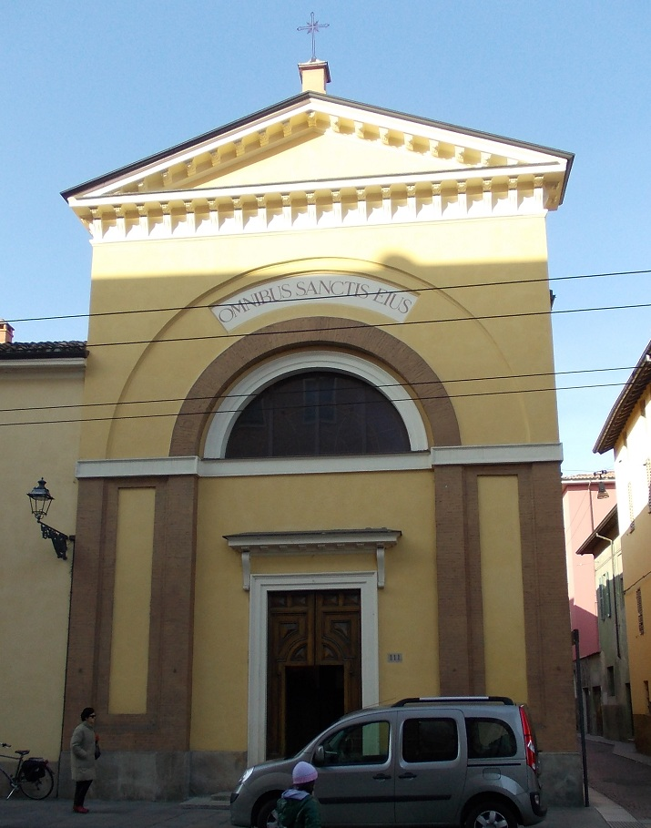 La facciata della chiesa parrocchiale di Ognissanti in via Bixio a Parma